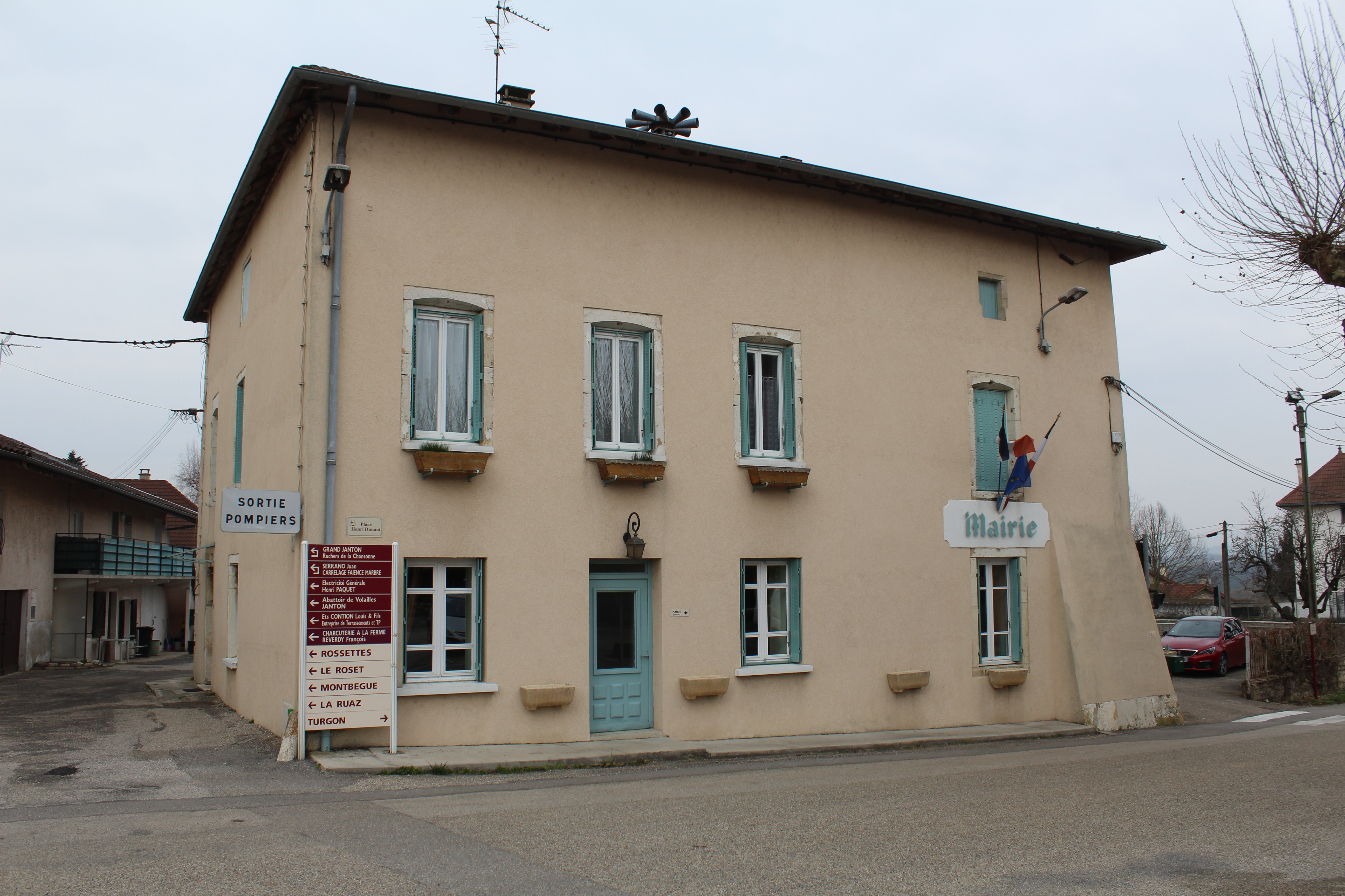 Mairie de Druillat.